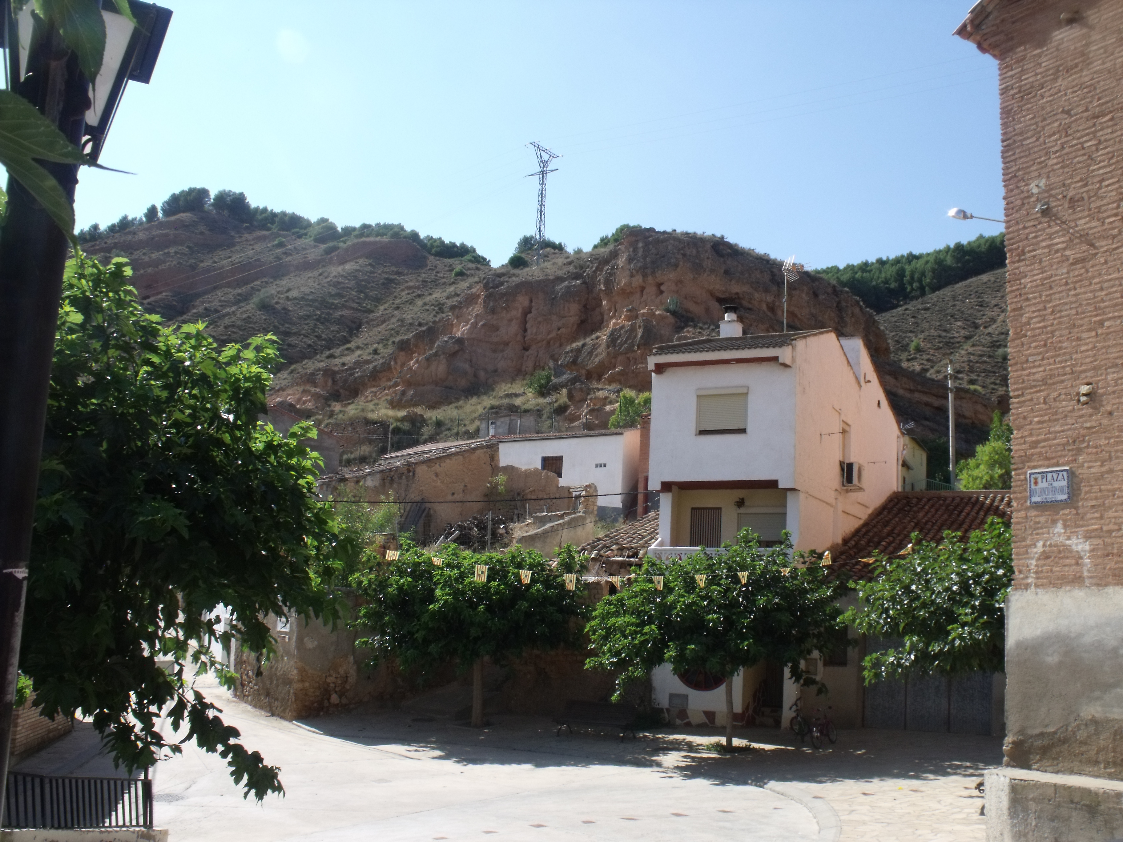 Plaza de Don Leoncio Fernández, Obispo.